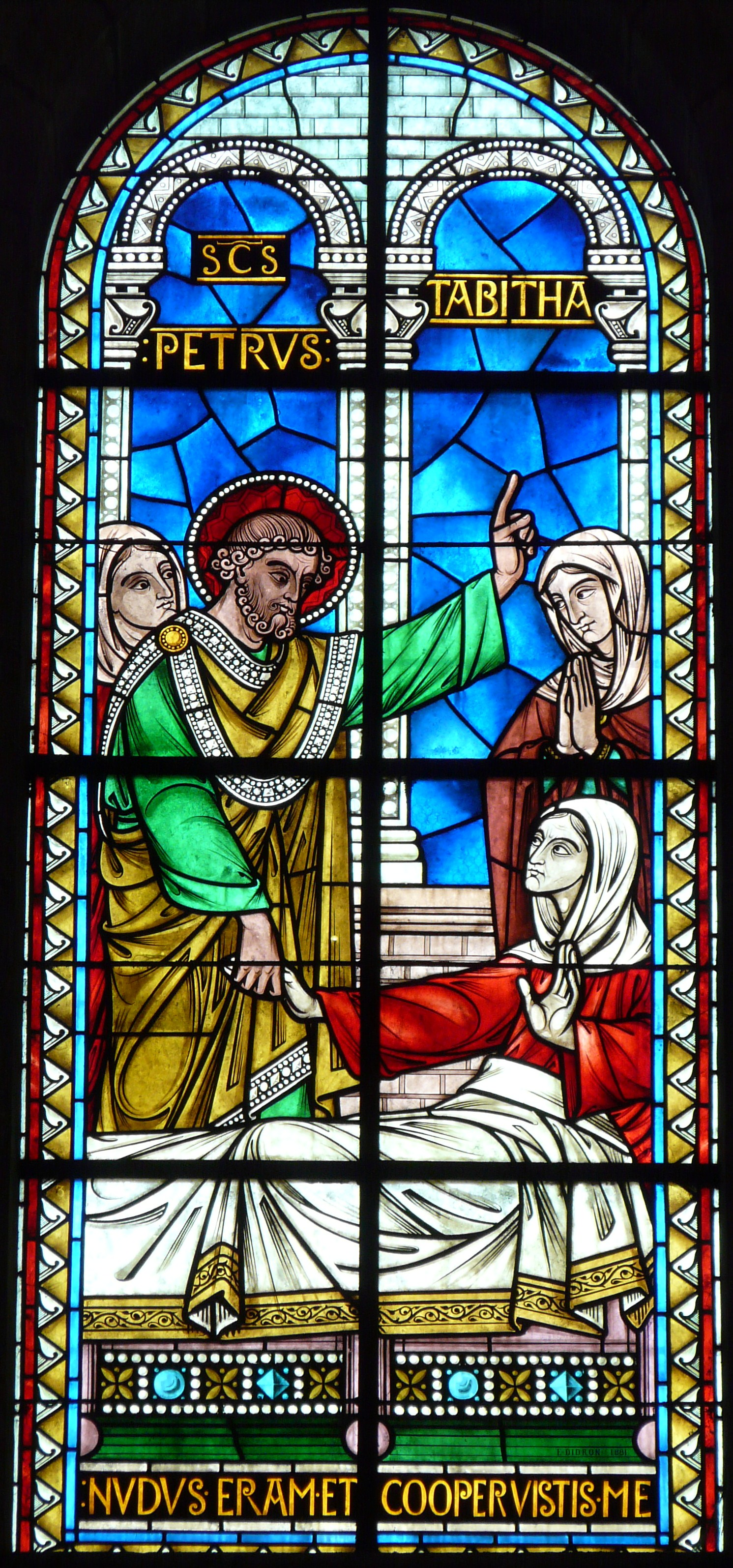 Vitrail représentant les Œuvres de miséricorde (saint Pierre ressuscite Tabitha ), mur nord de la cathédrale Saint-Front, Périgueux, Dordogne, France. Le vitrail, daté de 1881 est l'œuvre d'Édouard Didron.